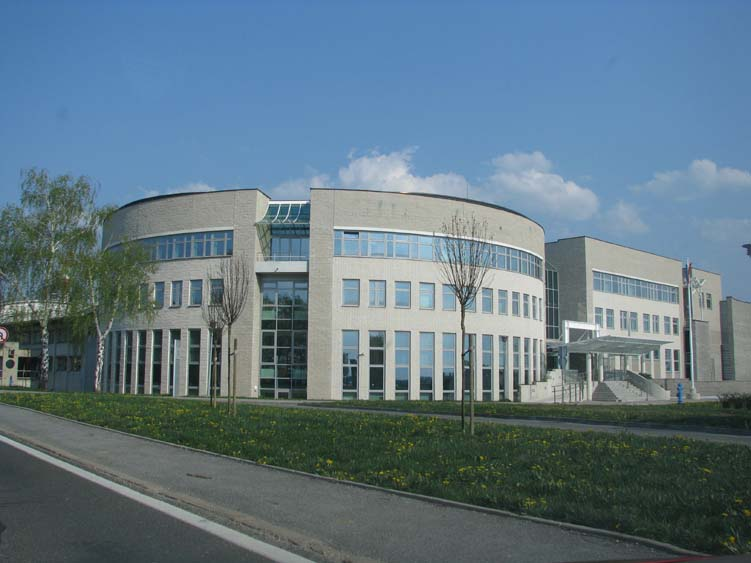 Zgrada Hrvatske kontrole zračne plovidbe u Zračnoj luci Zagreb